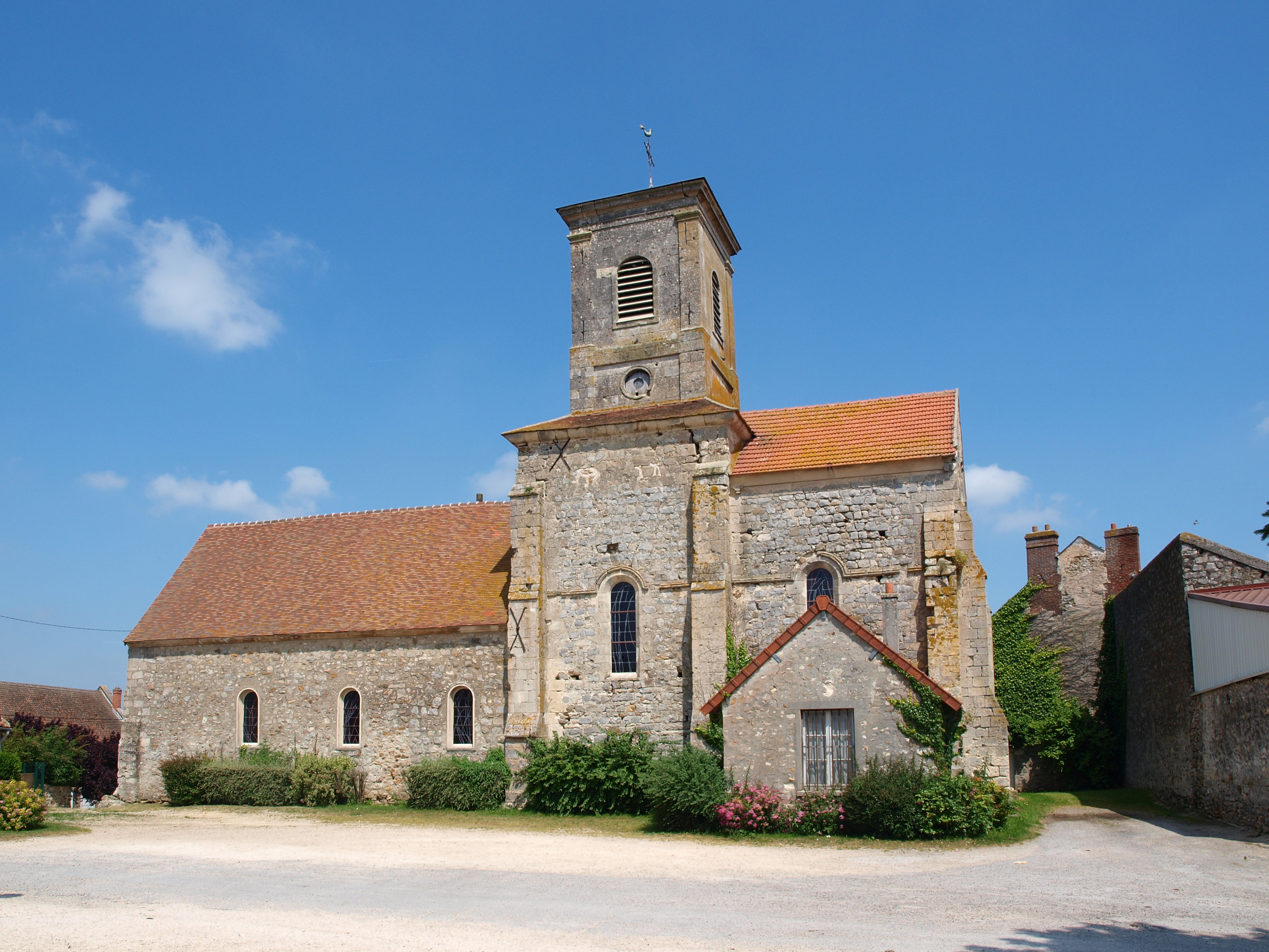 Rocourt-Saint-Martin (Aisne, France) ; église